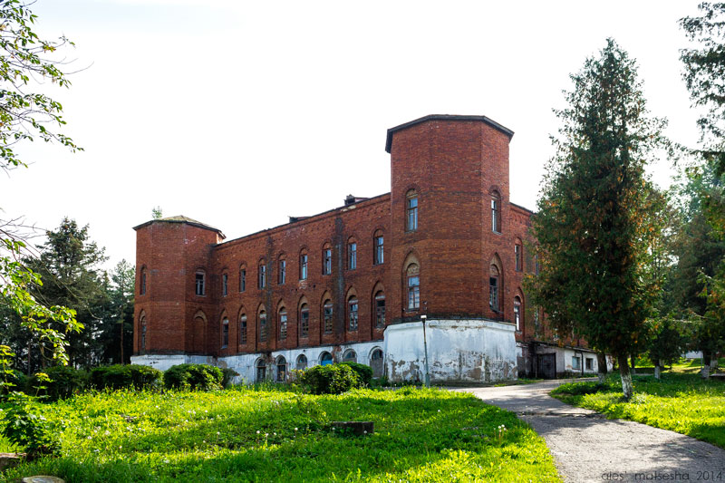 Юрцава. Былая сядзіба